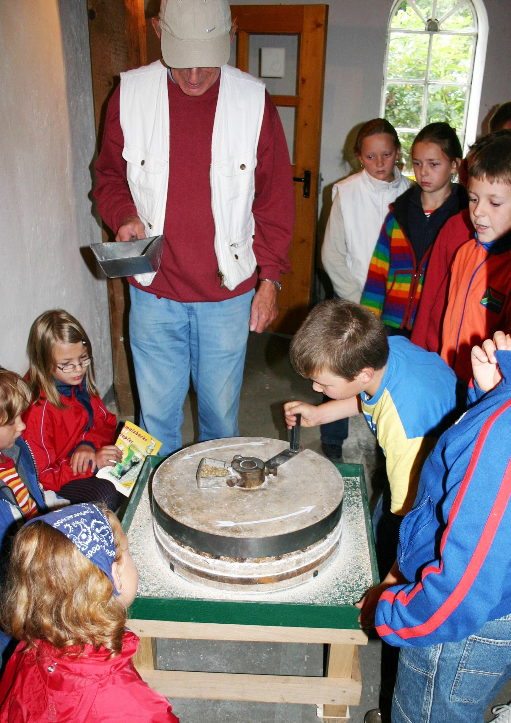 Mahlen von Getreide in der Wassermühle Deelbrügge mit einem Demonstrationsmühlstein